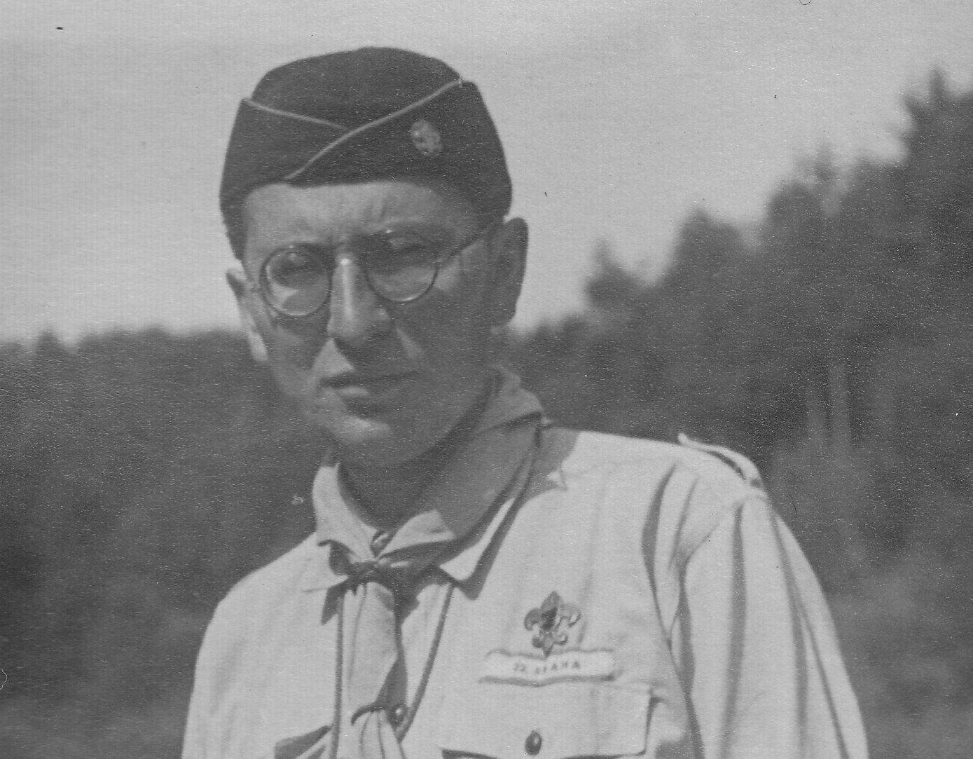 Karel Skála (1905-1973), skautský činovník, účastník třetího odboje a politický vězeň komunistického režimu